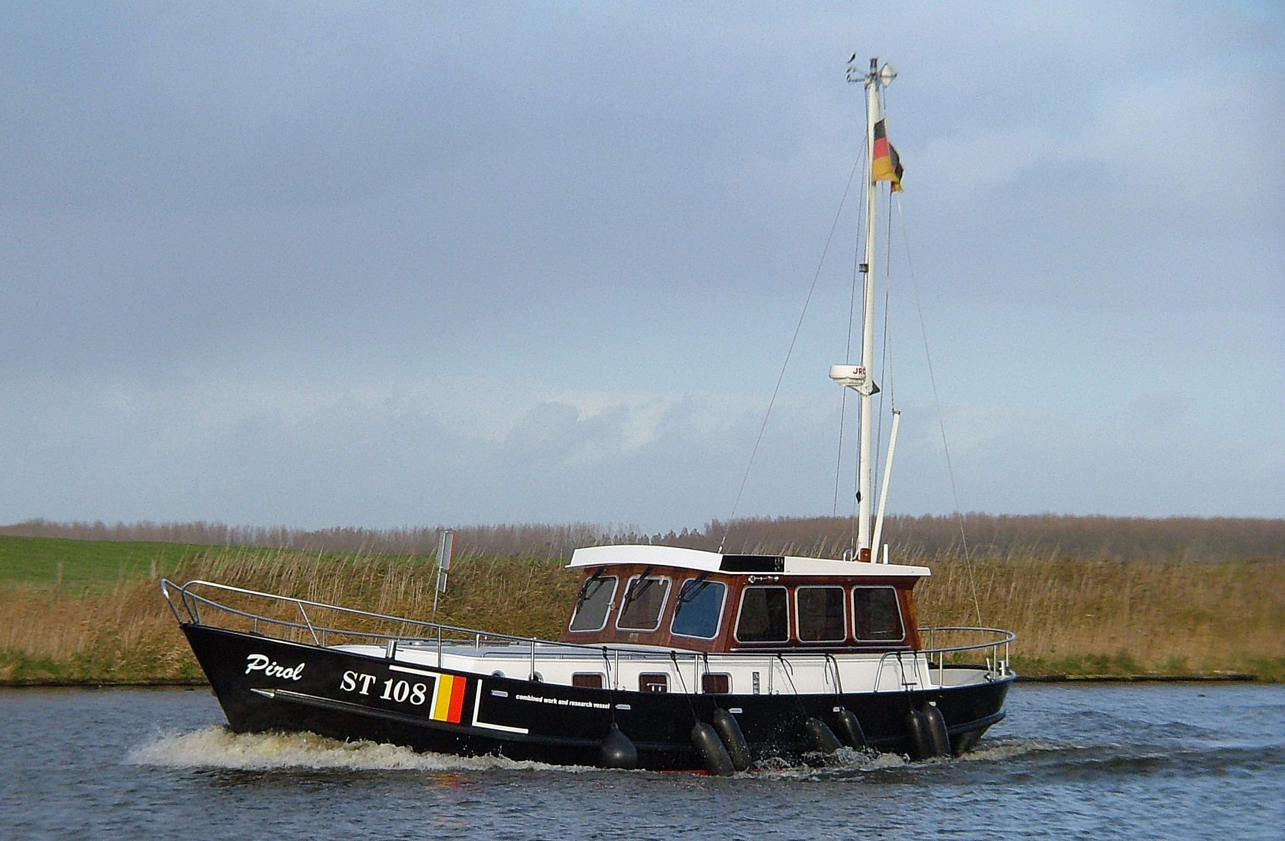 Die Pirol